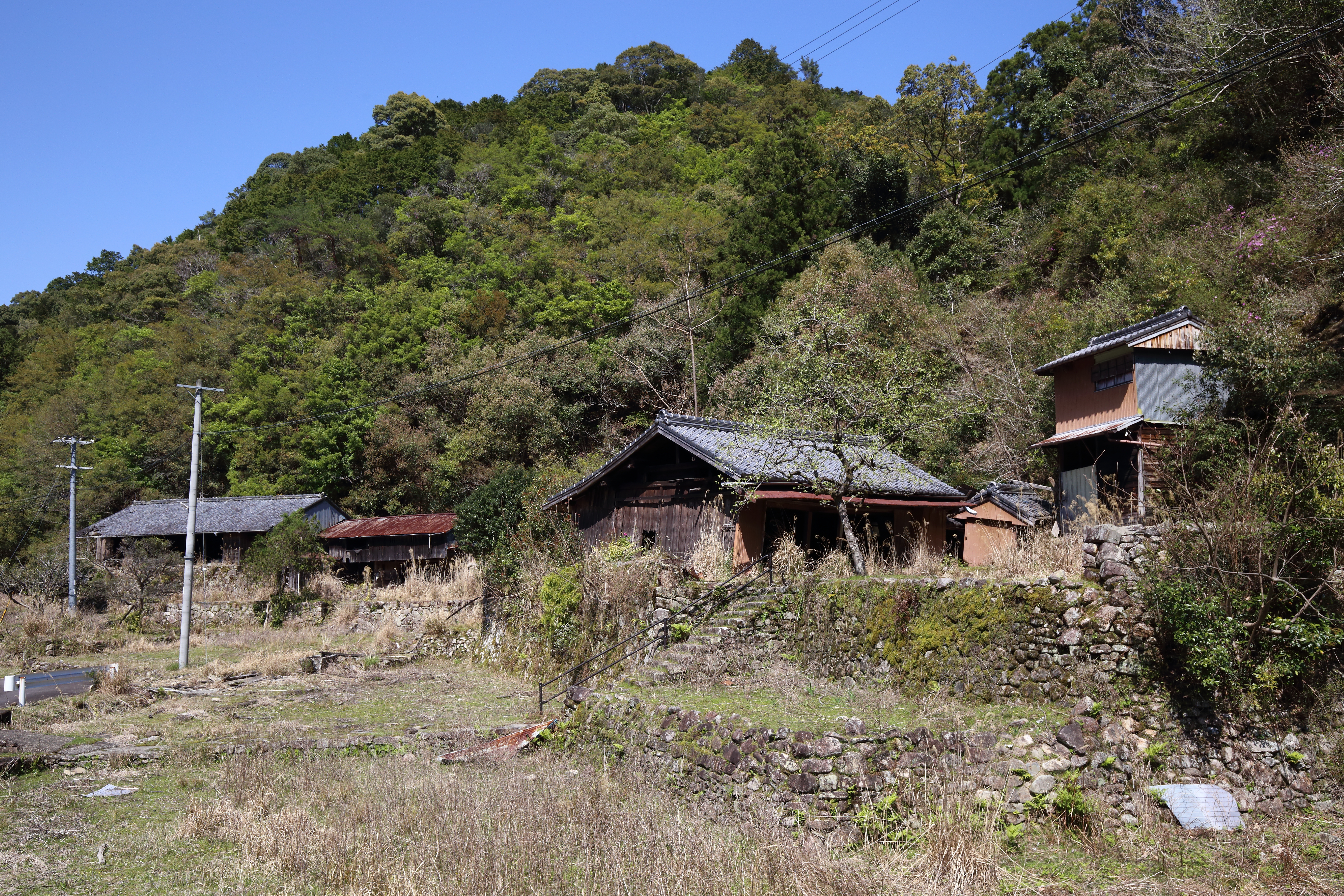 三重県熊野市紀和町花井 紀和町花井